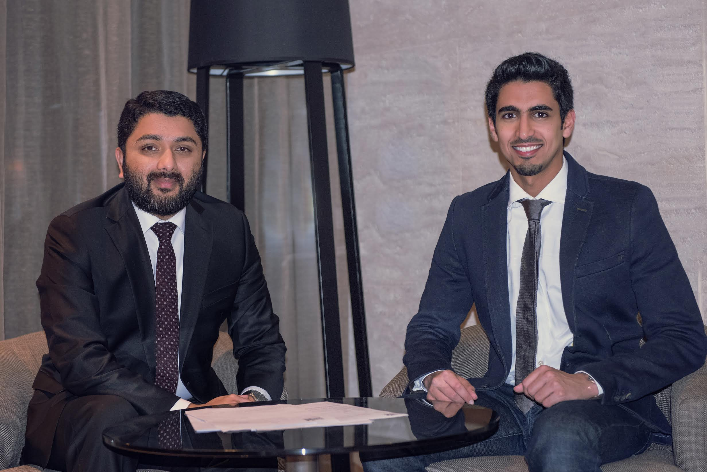 حمود الخضر وشريف حسن البنا المدير التنفيذي لشركة أويكينينج ريكوردز